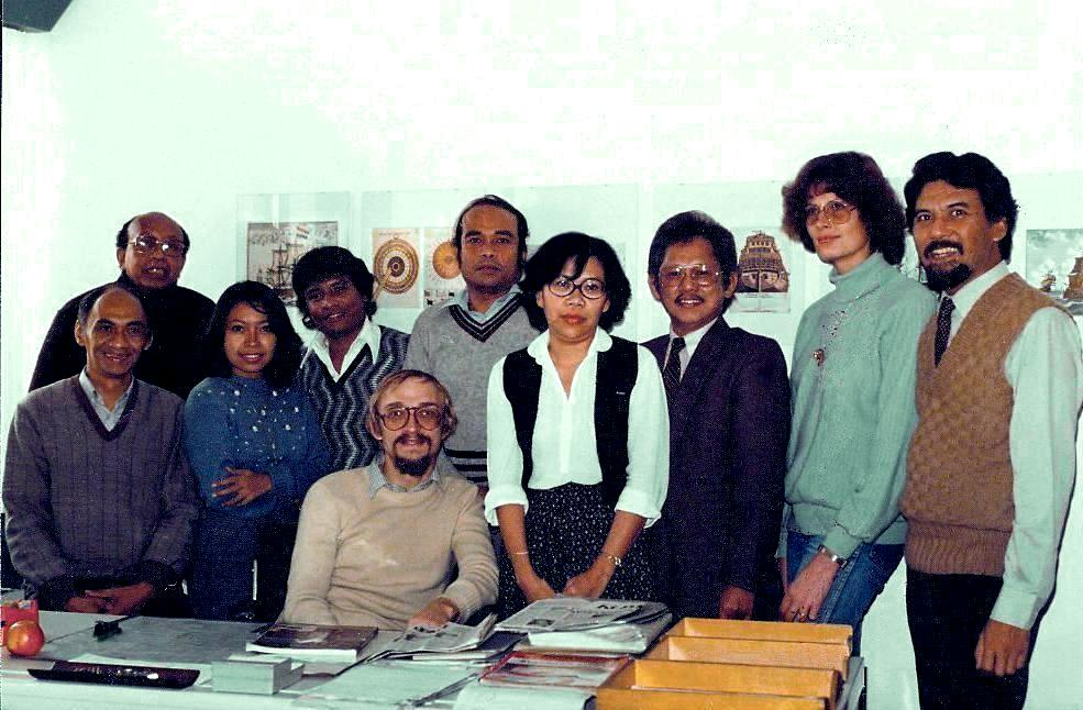 Rüdiger Siebert mit Mitarbeiter in der Indonesien-Redaktion der Deutschen Welle